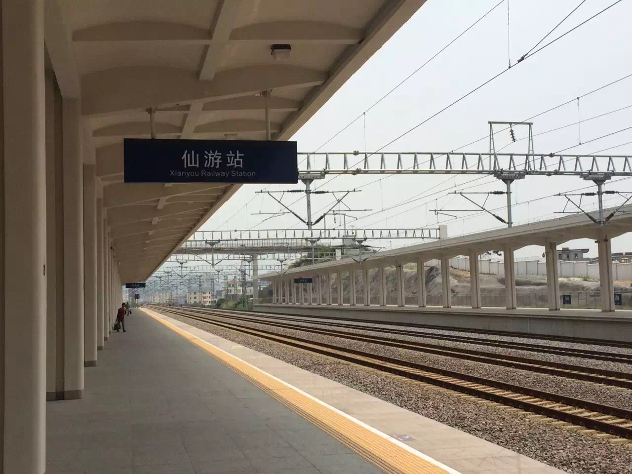 仙游站内场景，从一站台看二站台